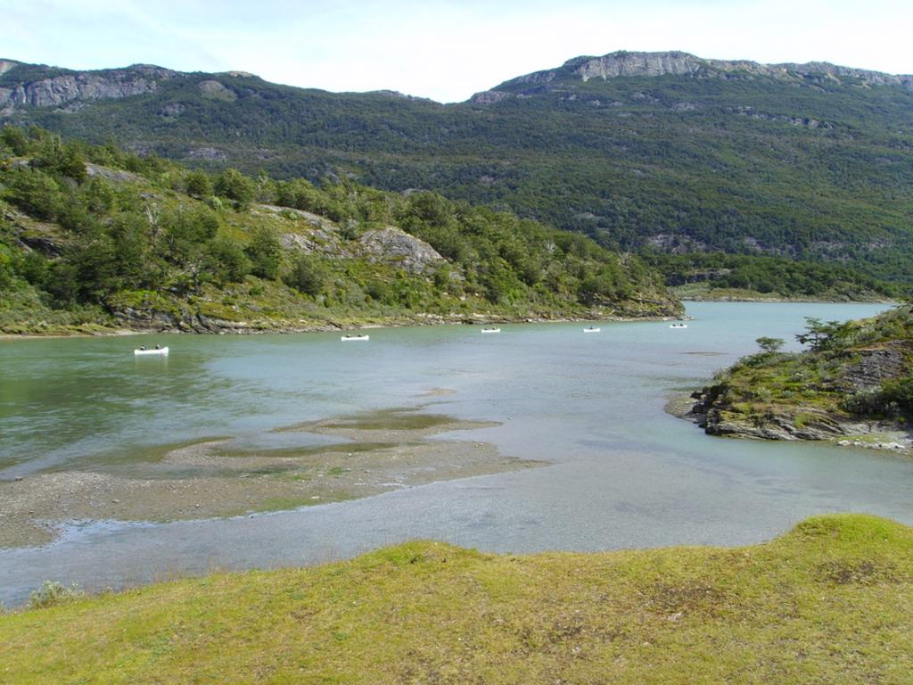 Lapataia River, at Parque Nacional Tierra del Fuego, Argentina